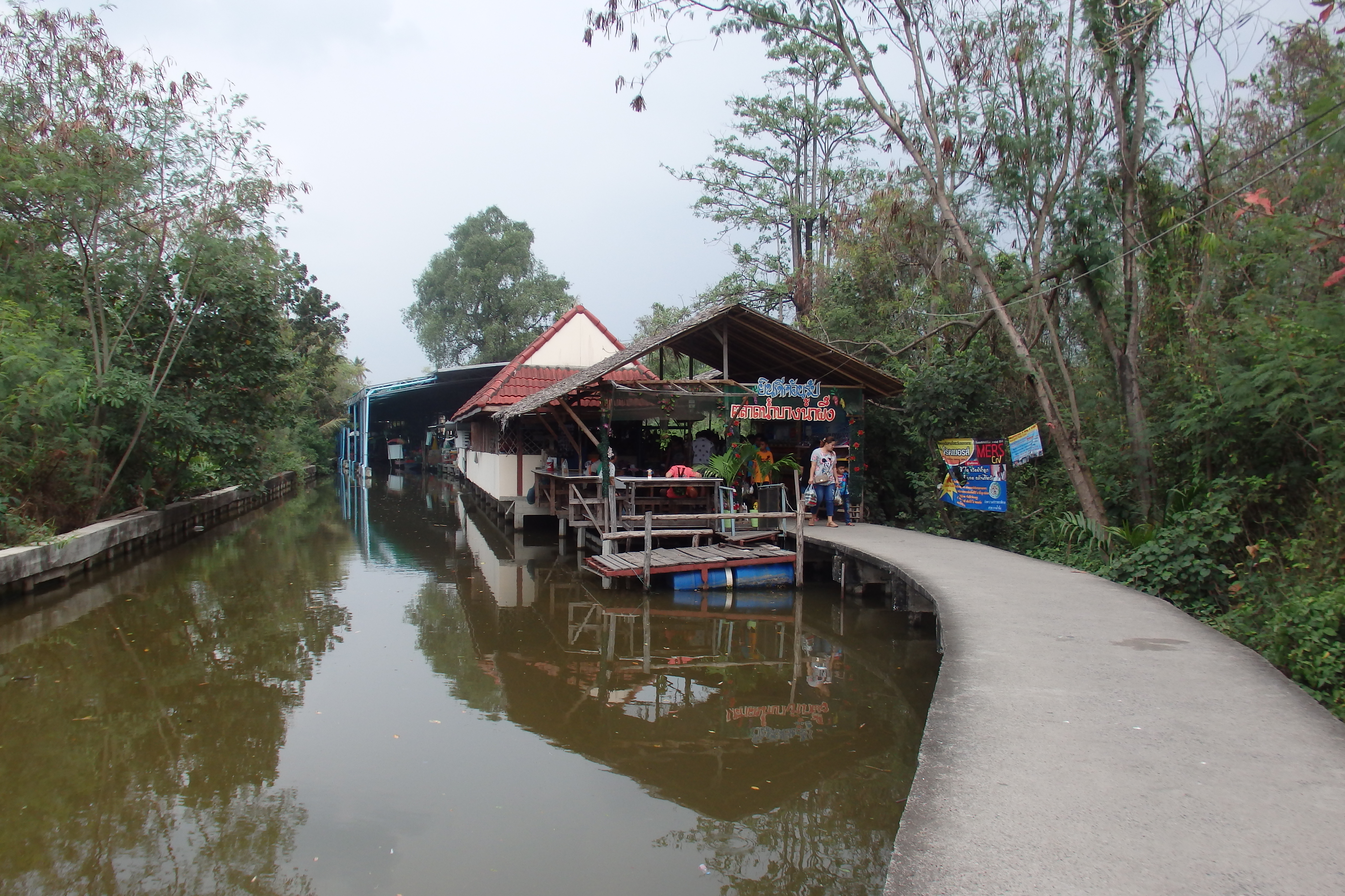 Phra Pradaeng District, Samut Prakan, Thailand